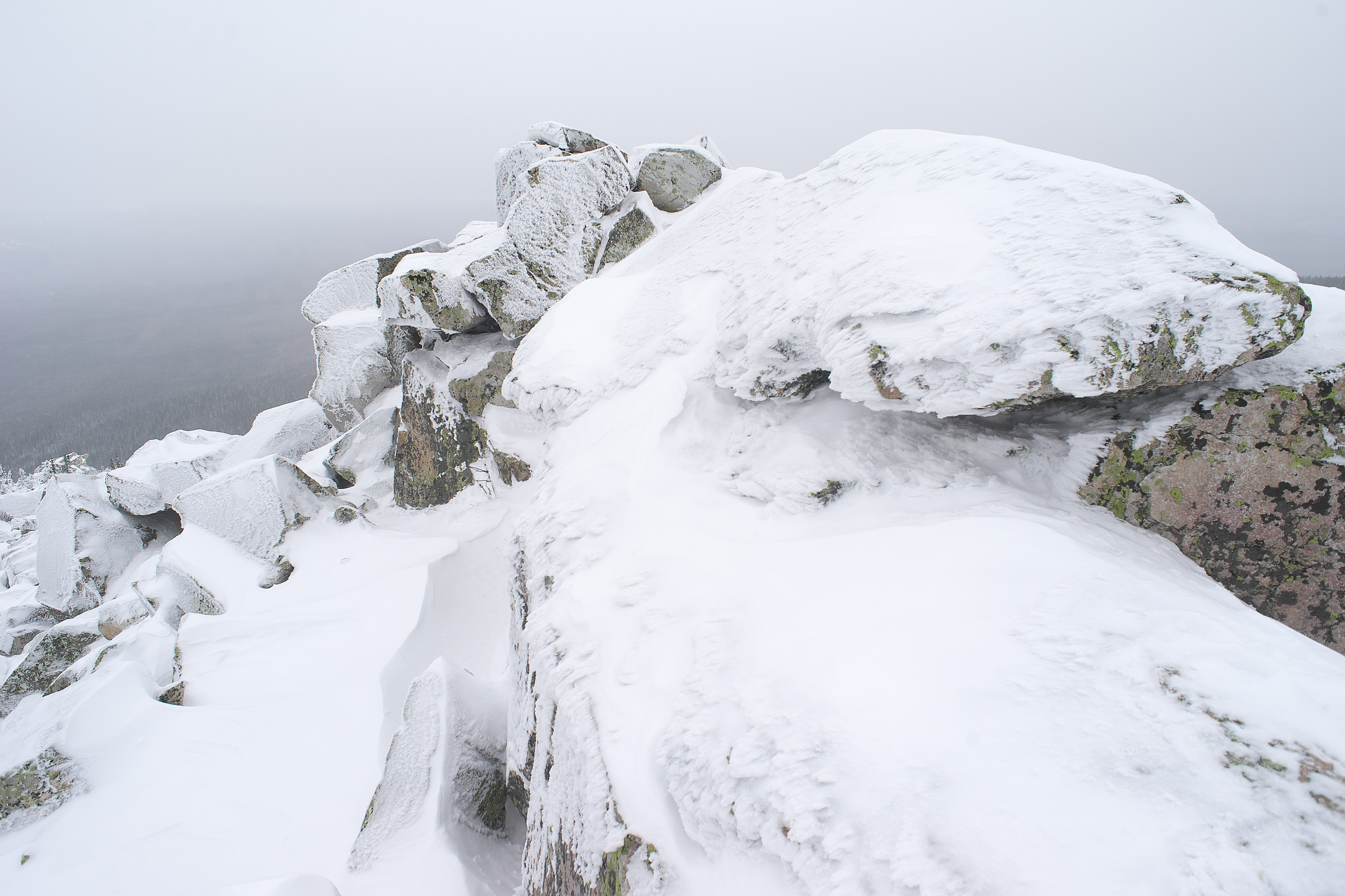 Вершина горы Ицыл: Златоуст, Челябинская область This image is related to the protected area of Russia number 7410094